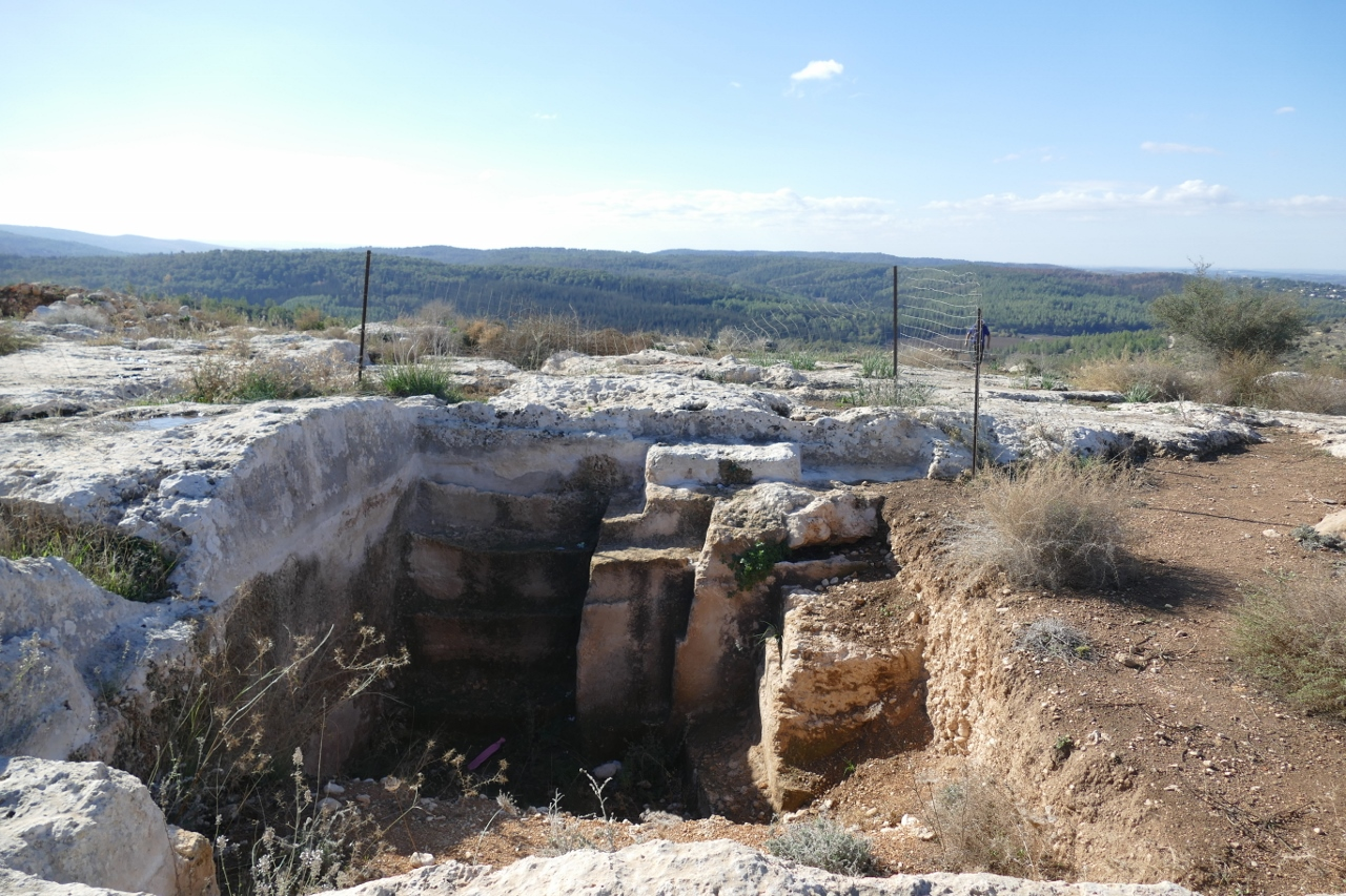 Horvat Eqed